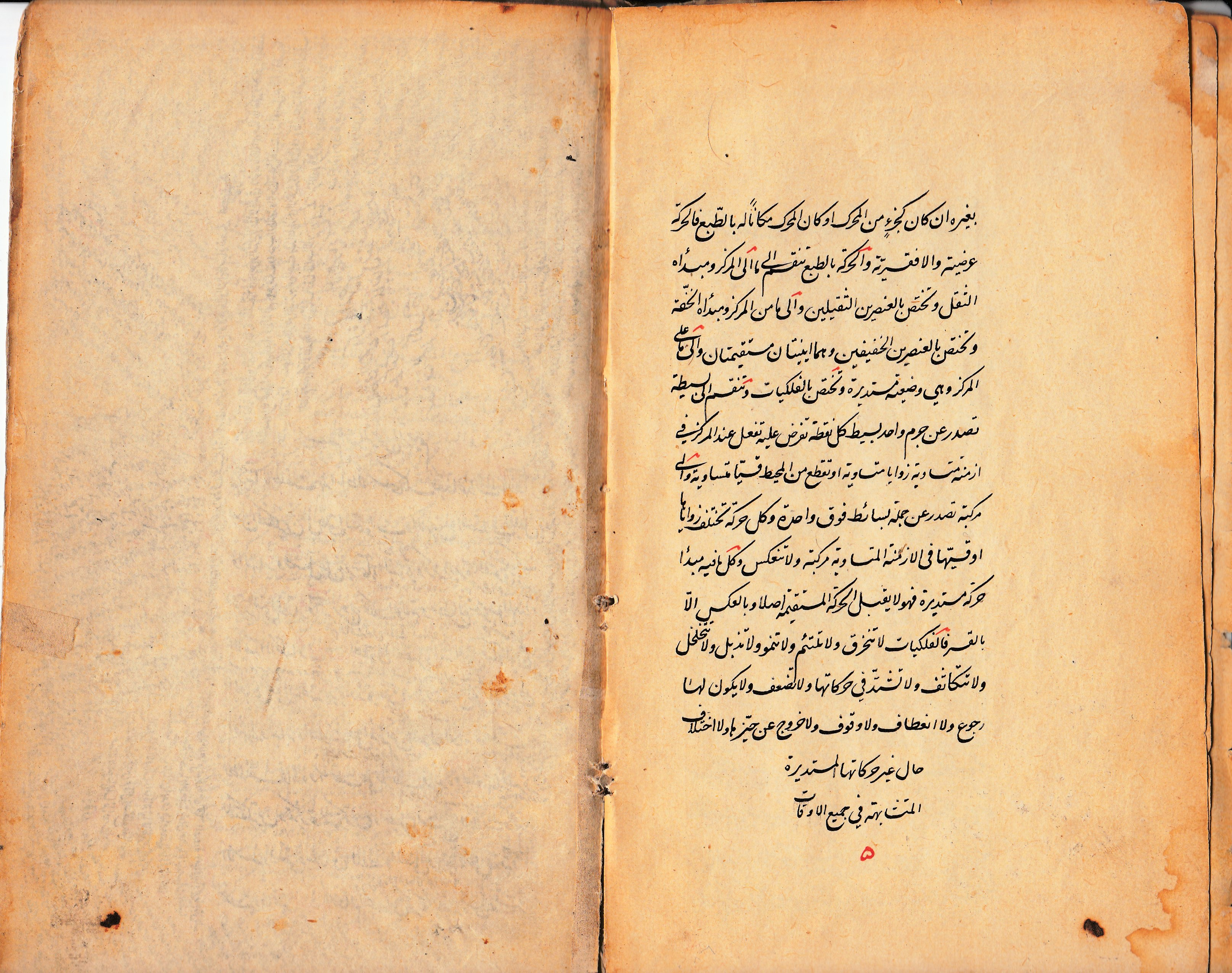 الصفحة الثالثة من مقدمة كتاب (تشريح الأفلاك) في علم الهيئة، من تأليف بهاء الدين العاملي وعلى غلاف الكتاب ختم واهداء الشيخ نعمان خير الدين الآلوسي إلى استاذهِ وشيخه ملا قاسم أفندي المفتي عام 1273هجري/ 1856م، في بغداد